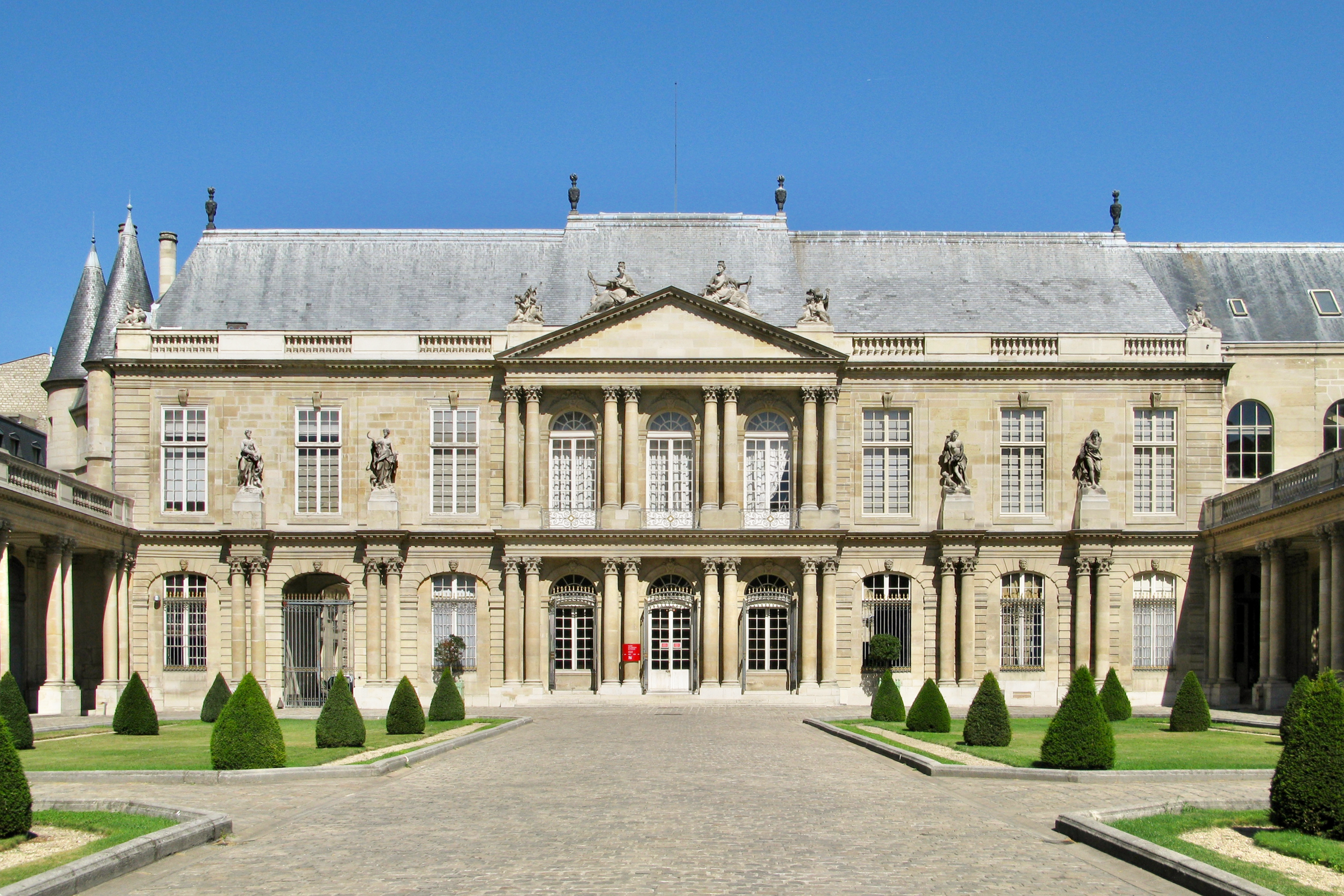 Hôtel de Soubise, Paris.